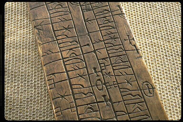 Runkalender av trä från Gotland. Motiv: Kat nr 085 Runkalender av trä Nyckelord: Runor Kategori: Runristning/runstenRunkalender av trä från Gotland.